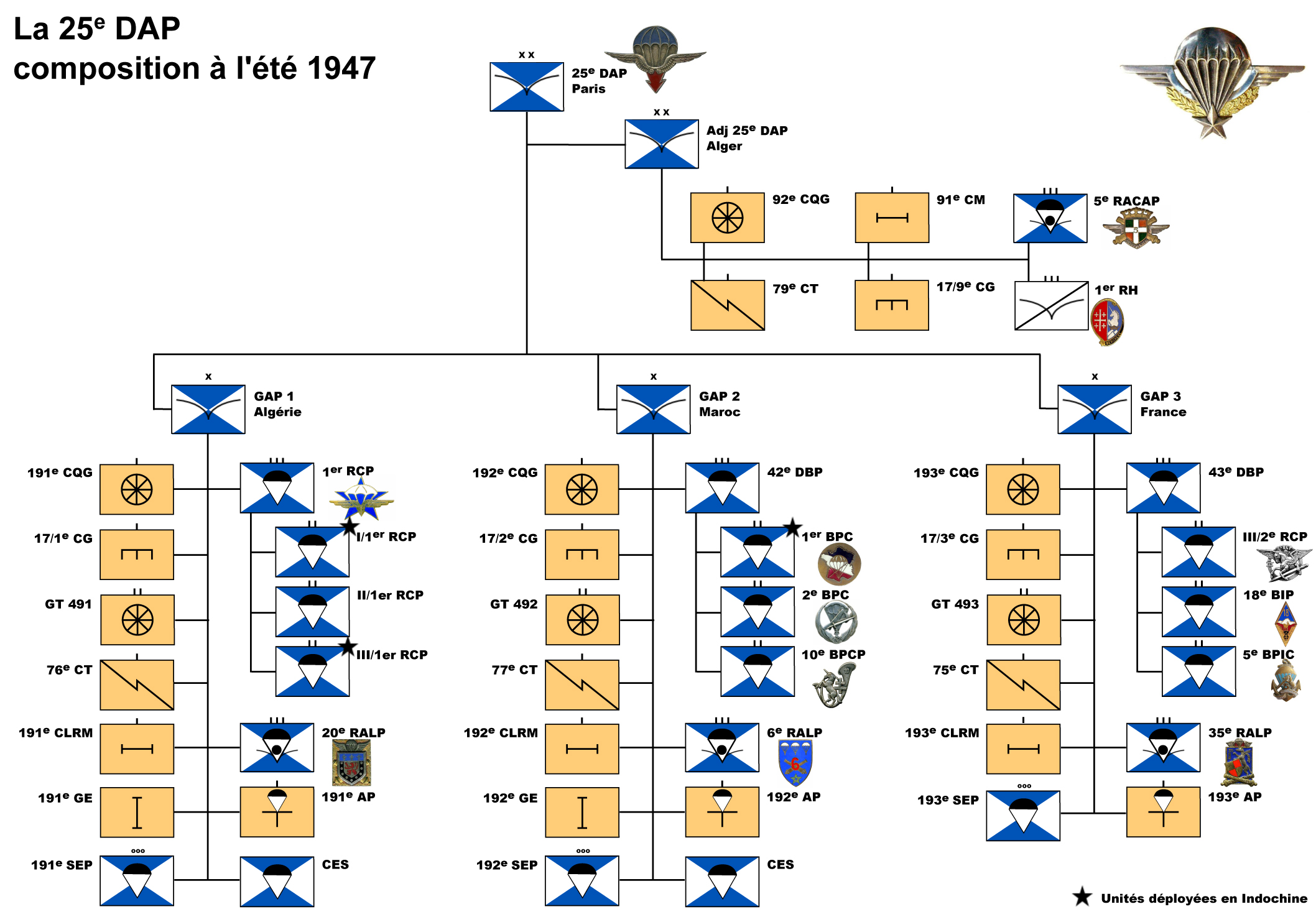 Organigramme de la 25e division aéroportée française à l'été 1947. D'après les informations tirées de l'ouvrage Histoire des parachutistes français.